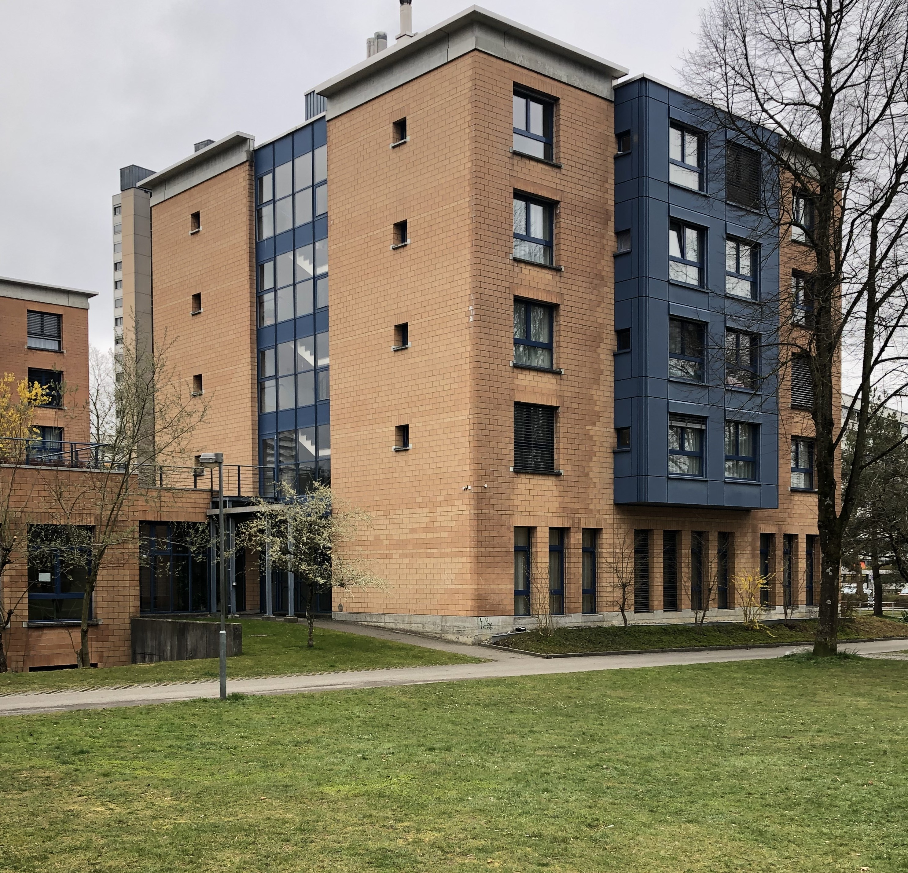 Ackerli Wochnheim Acherli